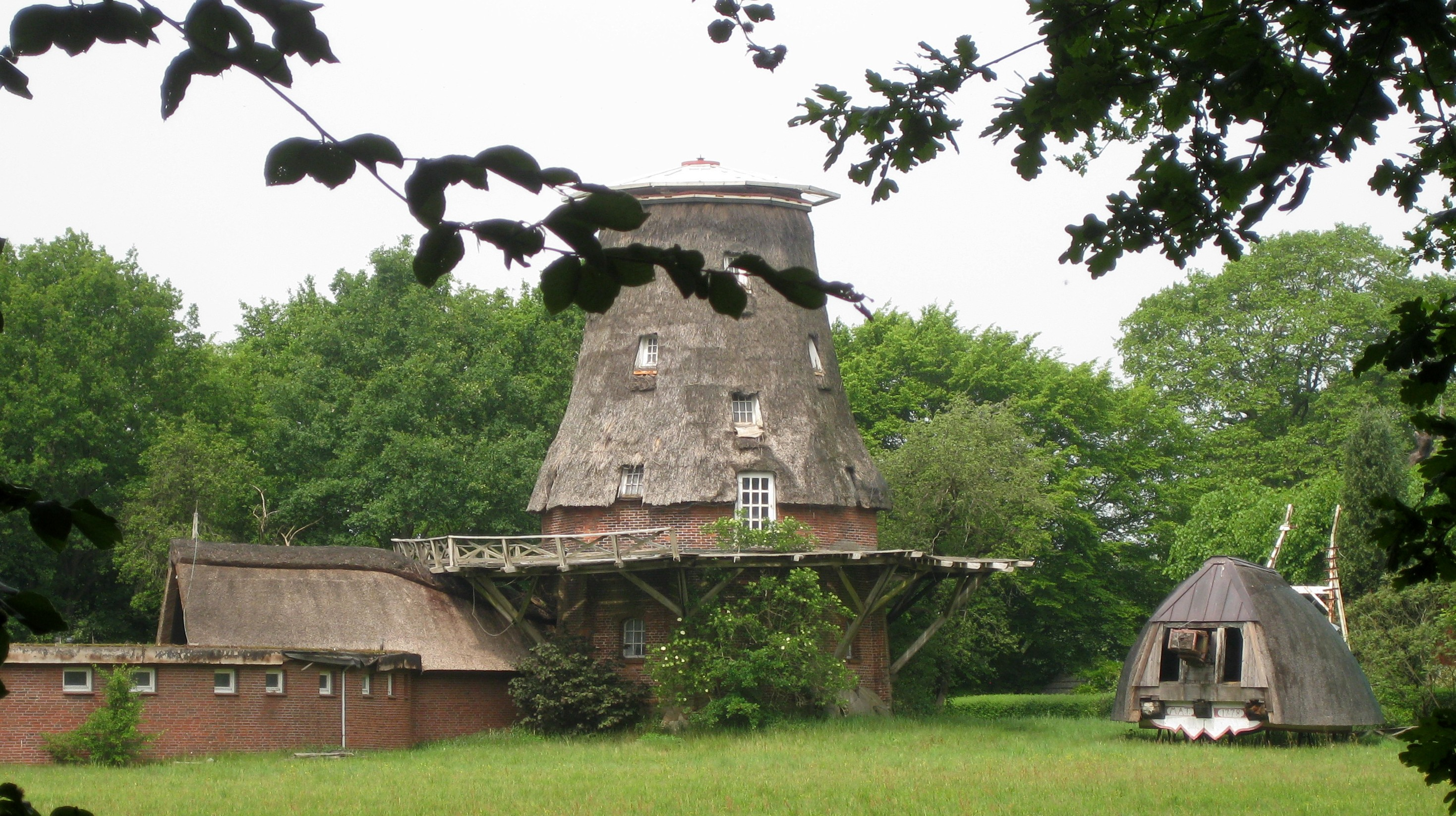 Galeriemühle in Hagen (i.Br.) - Mühlenkopf ist abgenommen und steht rechts auf dem Foto neben der Mühle.